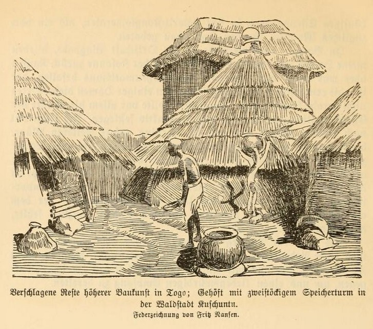 “Kuschuntu in Togo, Gehöft” - from Expeditionsbericht der Zweiten Deutschen Inner-Afrika-Expedition (1907-09) Auf dem wege nach Atlantis.